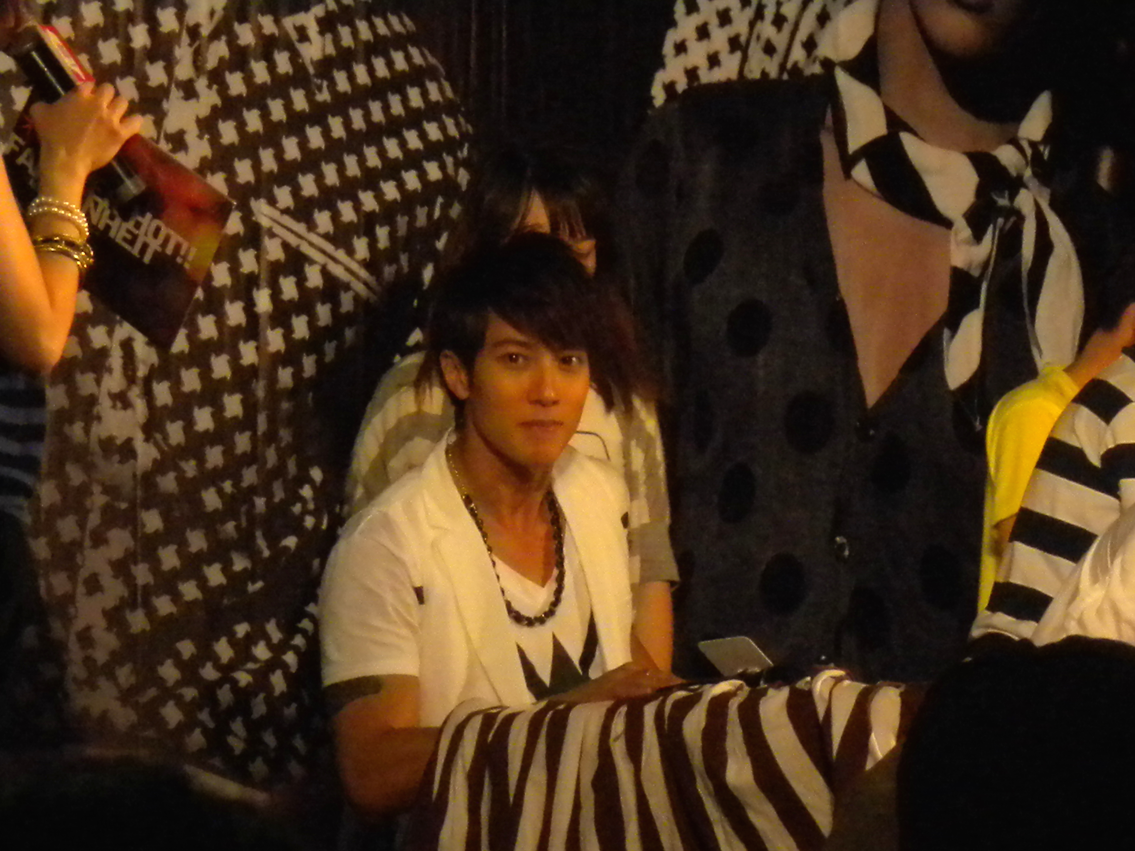 吳尊在《太熱》台中簽唱會的照片